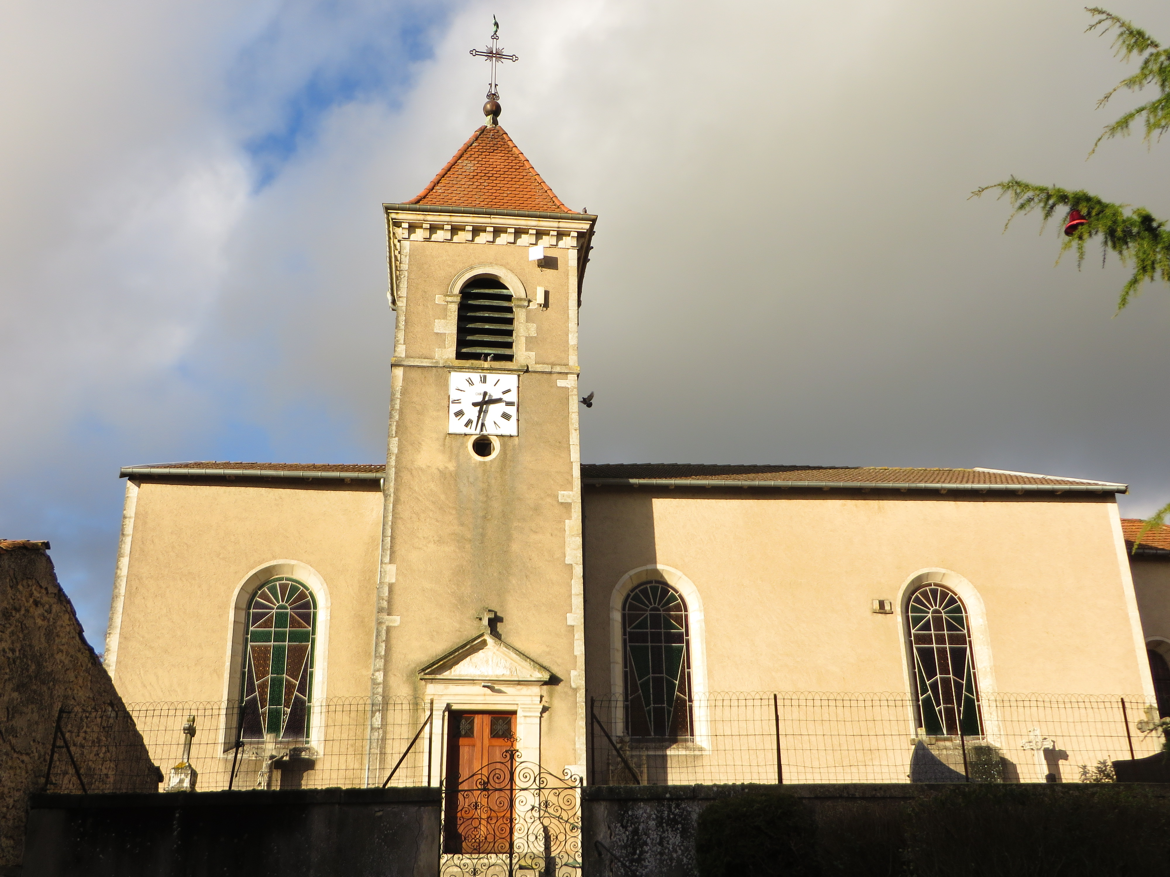 Tremblecourt eglise